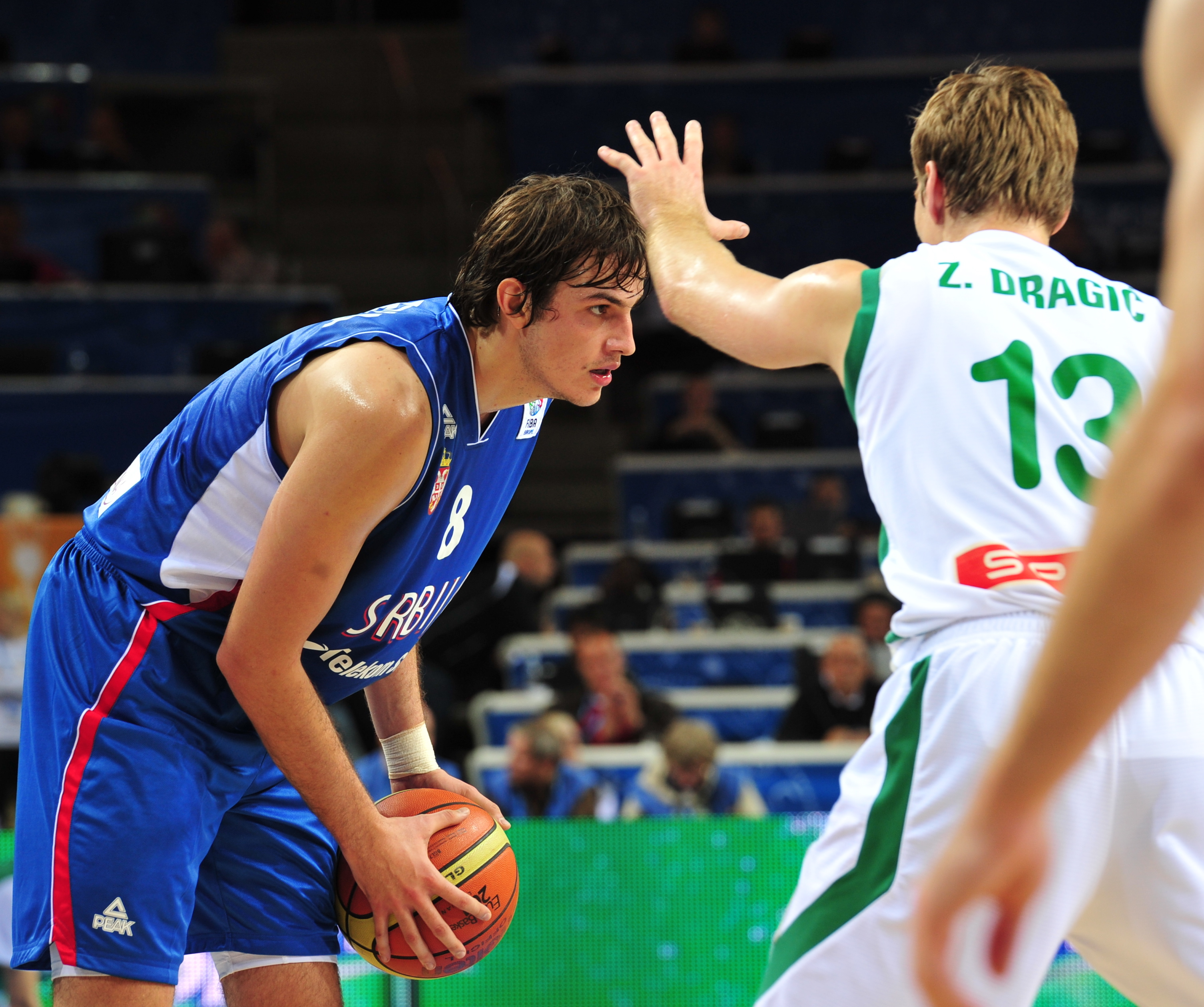 Zoran Dragić at Eurobasket 2011 defending on Nemanja Bjelica (Serbia)